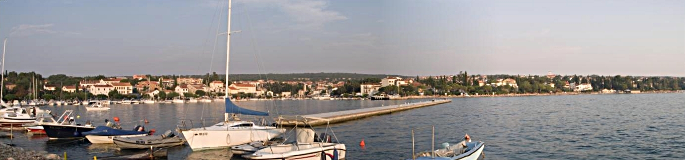 Malinska na otoku Krku